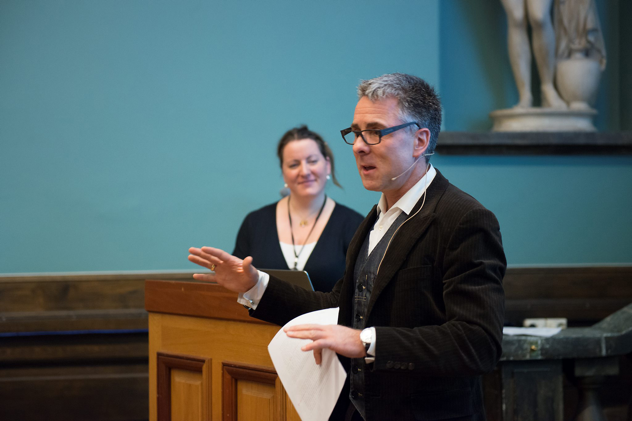 Nils Ohlsen under et seminar i Nasjonalmuseet for kunst, arkitektur og design. Foto: Frode Larsen / Nasjonalmuseet